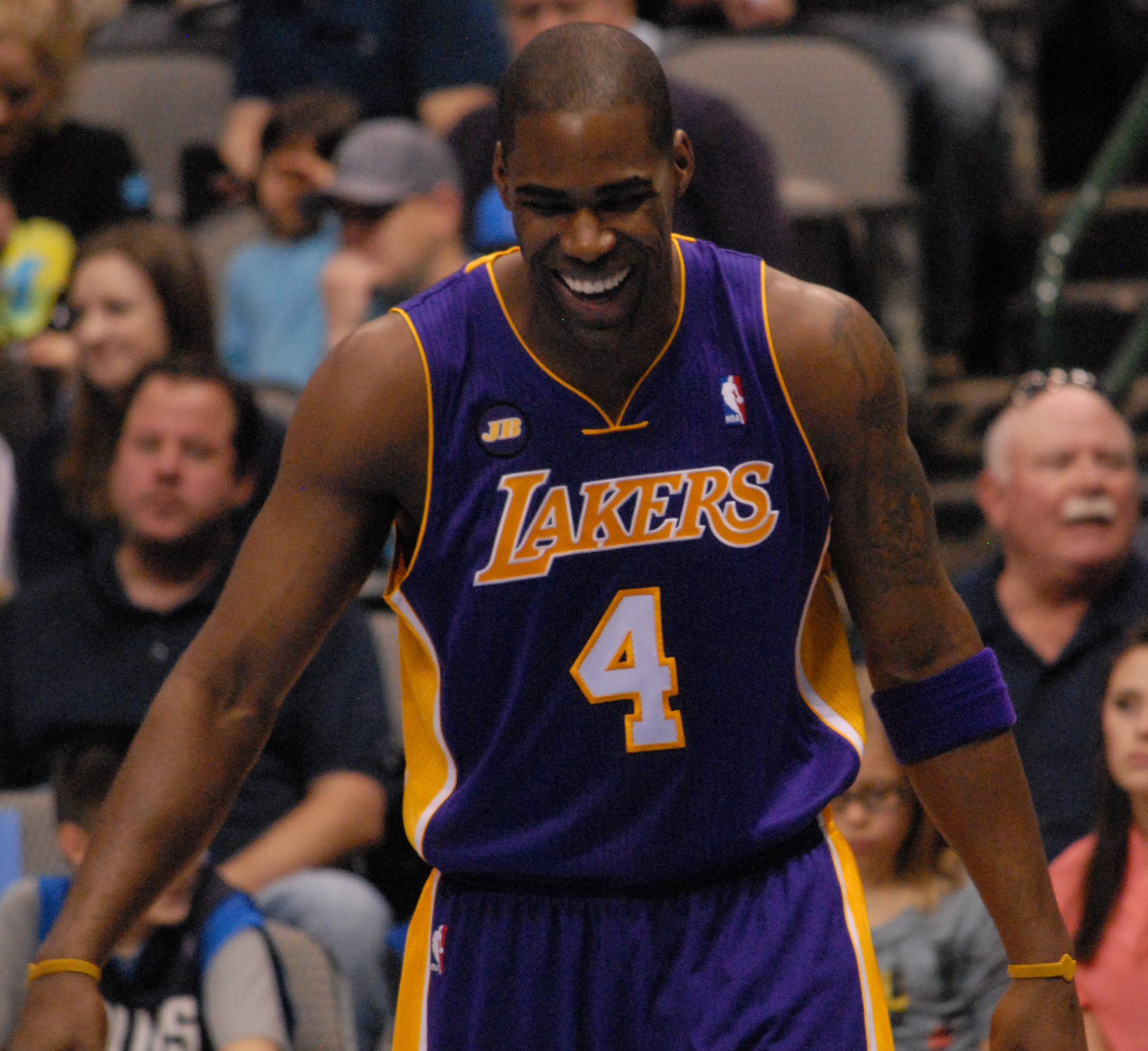 basketball,nba,2/24/2013 antawn jamison